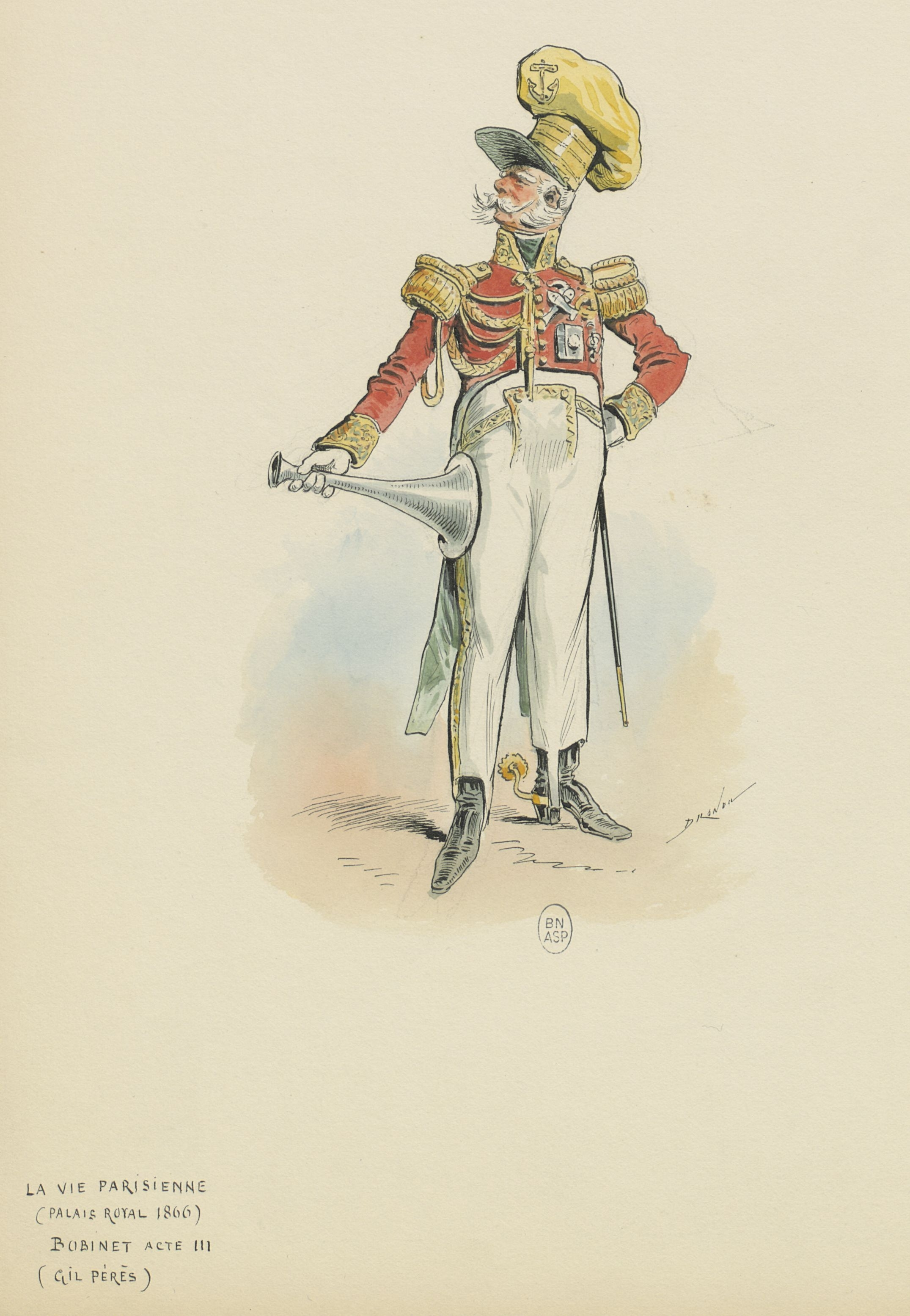 La vie parisienne, opéra-bouffe de Meilhac,Halévy et Offenbach : portraits des acteurs en costumes par Draner